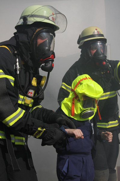 Übung der Feuerwehr Voxtrup anlässlich des Tag der offenen Tür 2010.